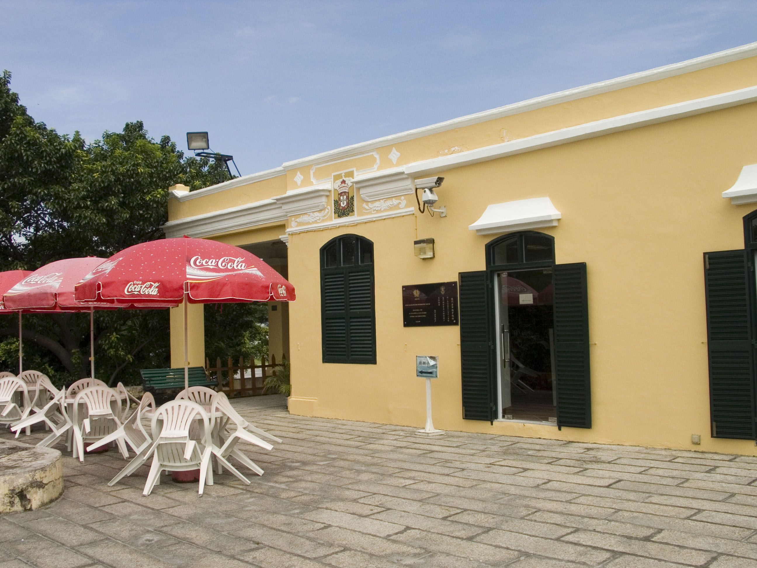 Associação de Escoteiros de Macau